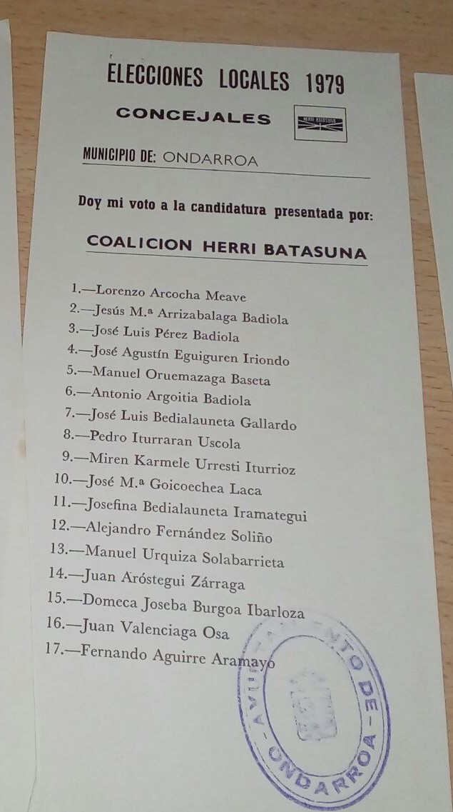 Herri Batasunak 1979ko udal hauteskundeetan Ondarroan aurkeztutako zerrenda